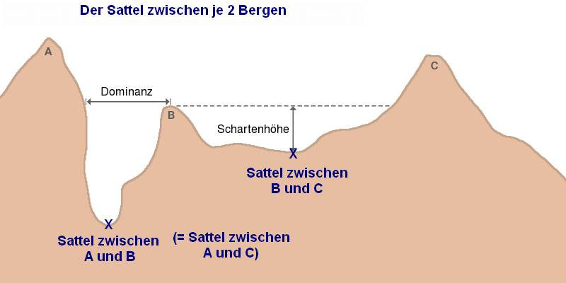 Der Sattel zwischen 2 oder mehr Bergen